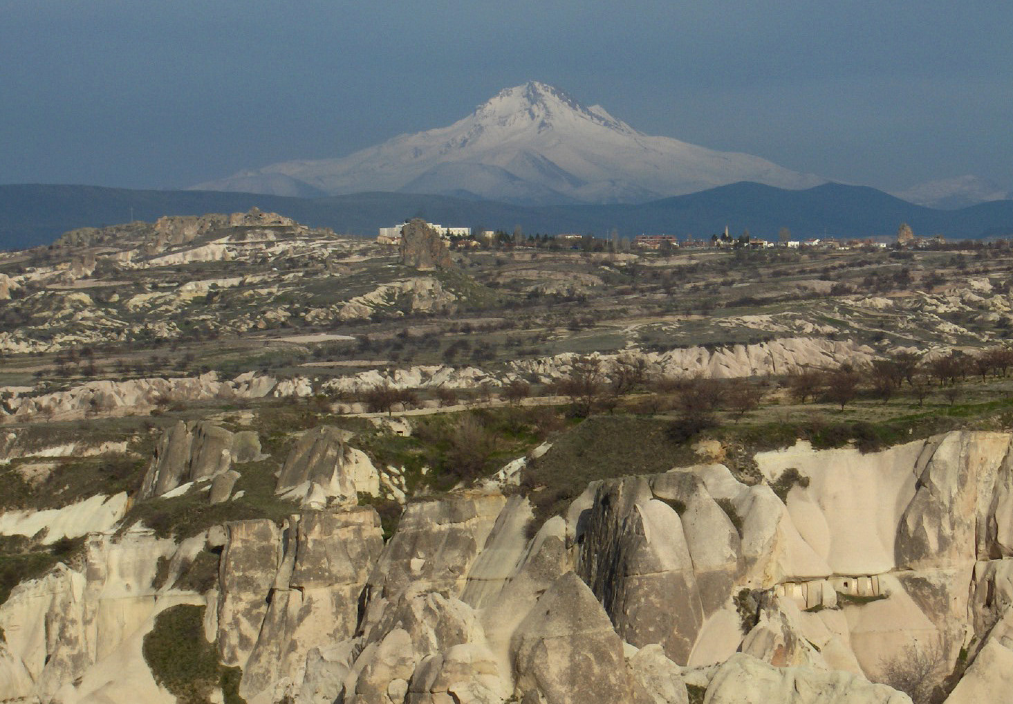 Mount Erciyes; Cappadocia, Turkey